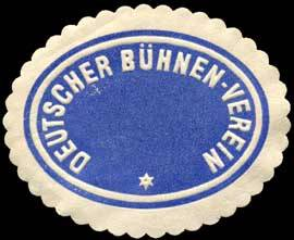 Sealing stamp Title: Deutscher Bühnen - Verein Description: blau, weiß, geprägt Place: size: 3x4 cm